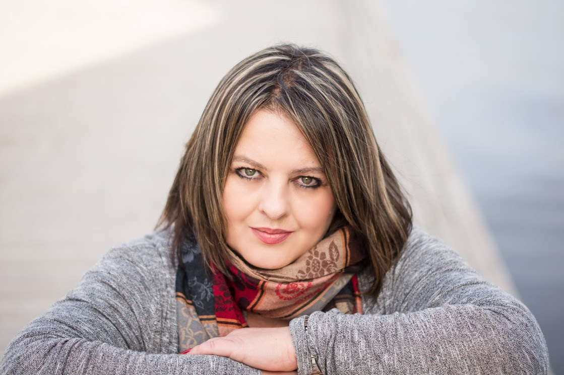 Joanna Jax